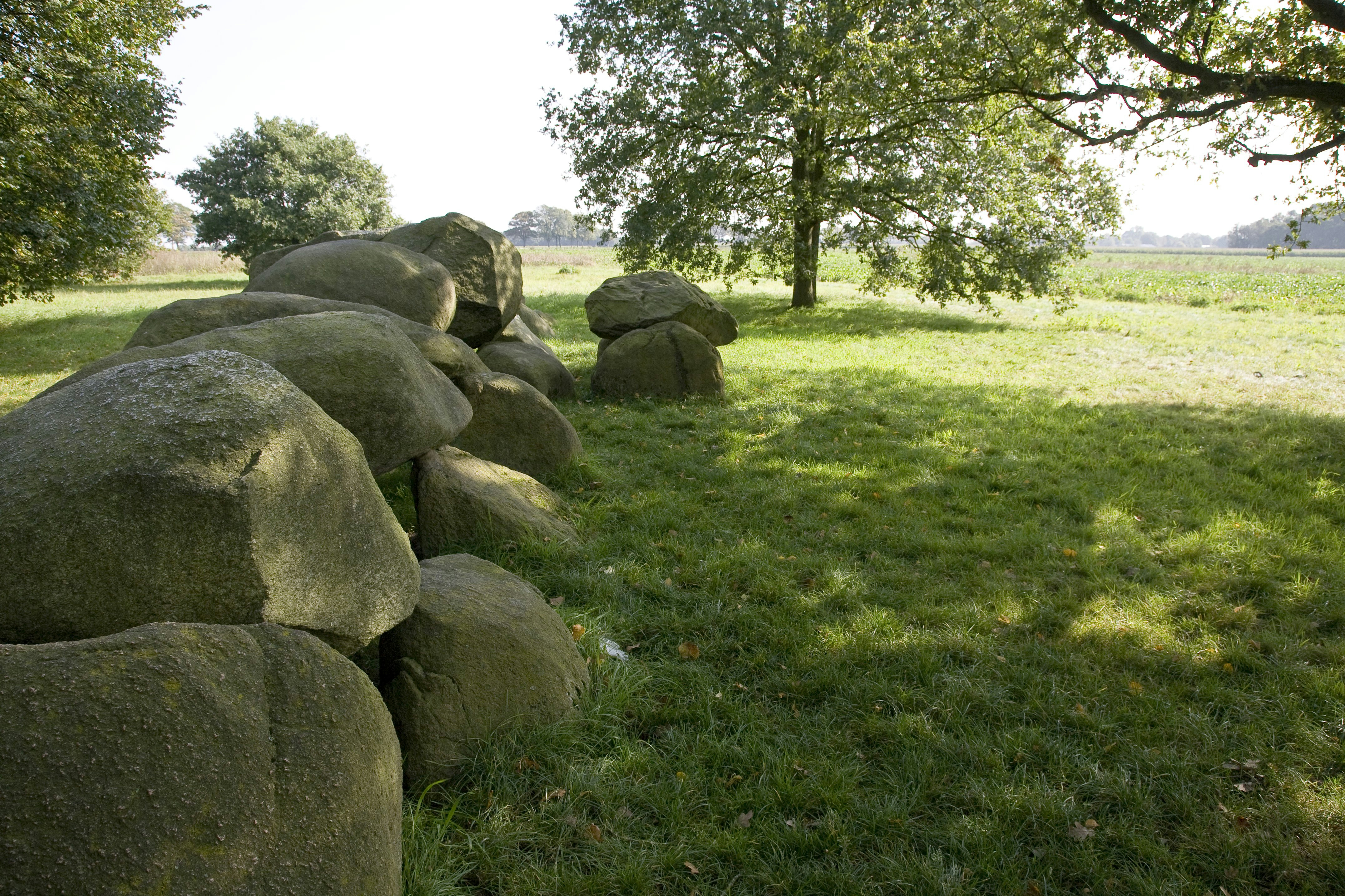 Hunebed D16: Ligging van hunebed D16 aan het beekdal van het Looner Diep (opmerking: Gemaakt voor publicatie landschapsbiografie Drentse Aa)